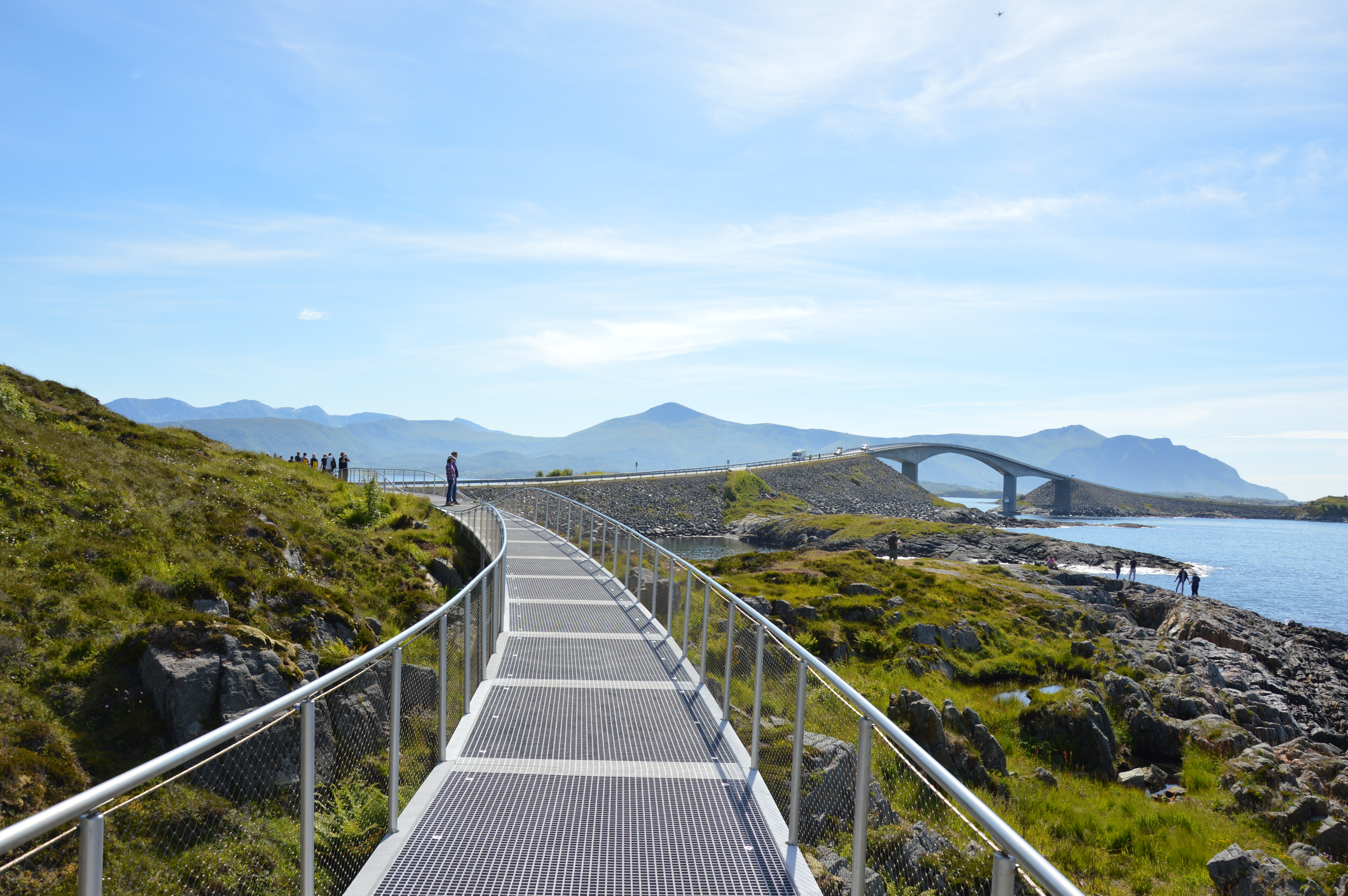 Lyngholmen